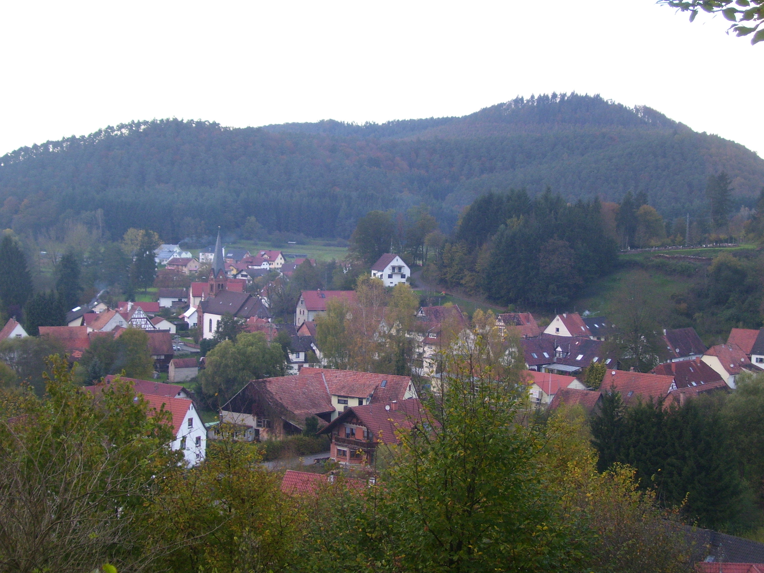 Bobenthal vom "Miehlkebbl" aus gesehen.